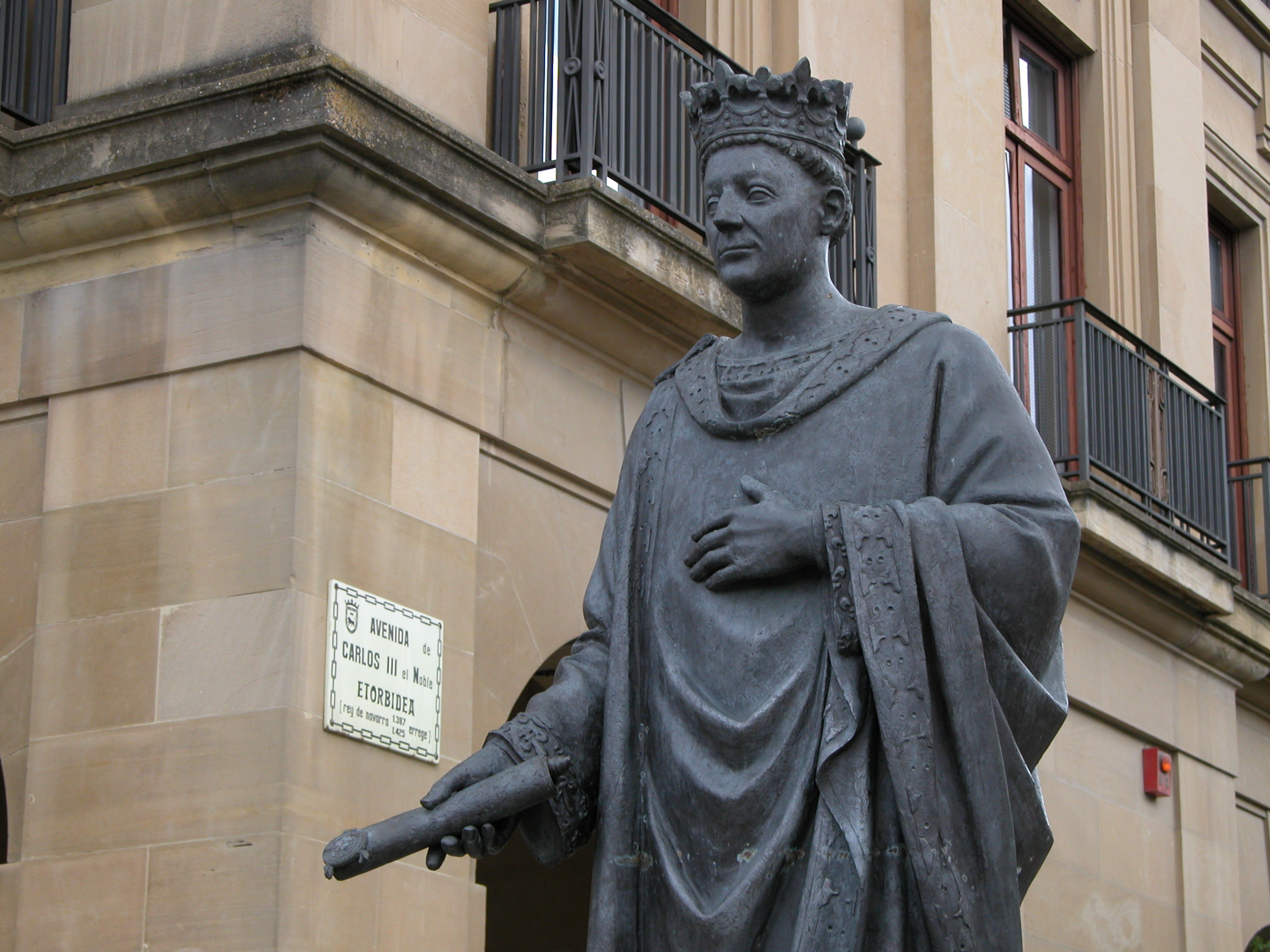 Statue de Charles III de Navarre à Pampelune